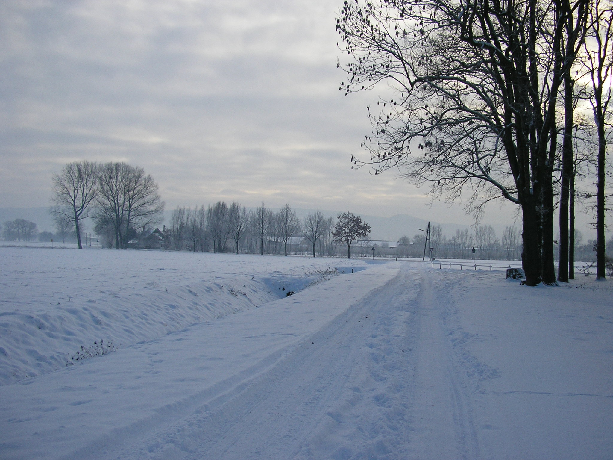 Winterlandschaft im Lübbecke Nähe Kanal